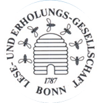 Logo der Bonner Lese- und Erholungs-Gesellschaft von 1787 Lese_(Bonn)